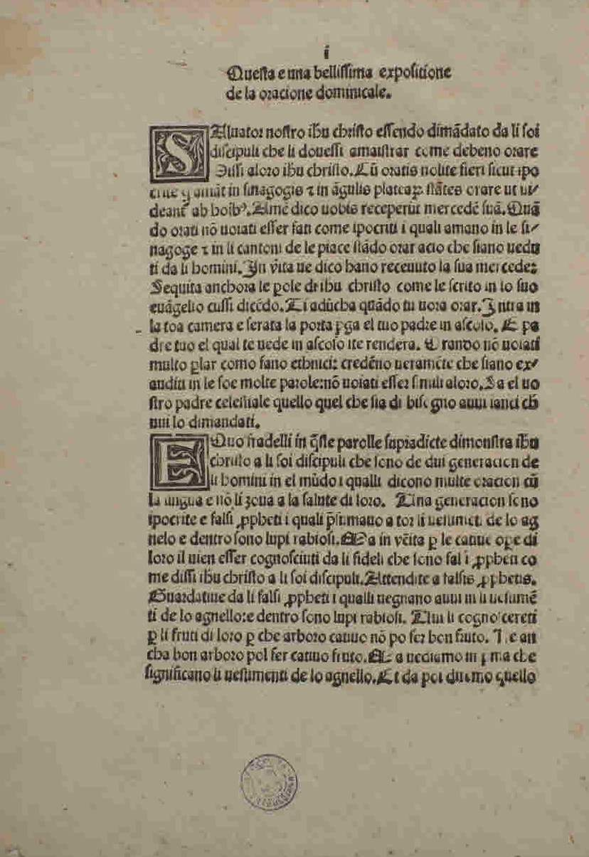 Esposizione dell'orazione domenicale. - [Padova] : [Matteo Cerdonis], anno domini 1483. - 6 c. ; [*]⁶ ; 4°.